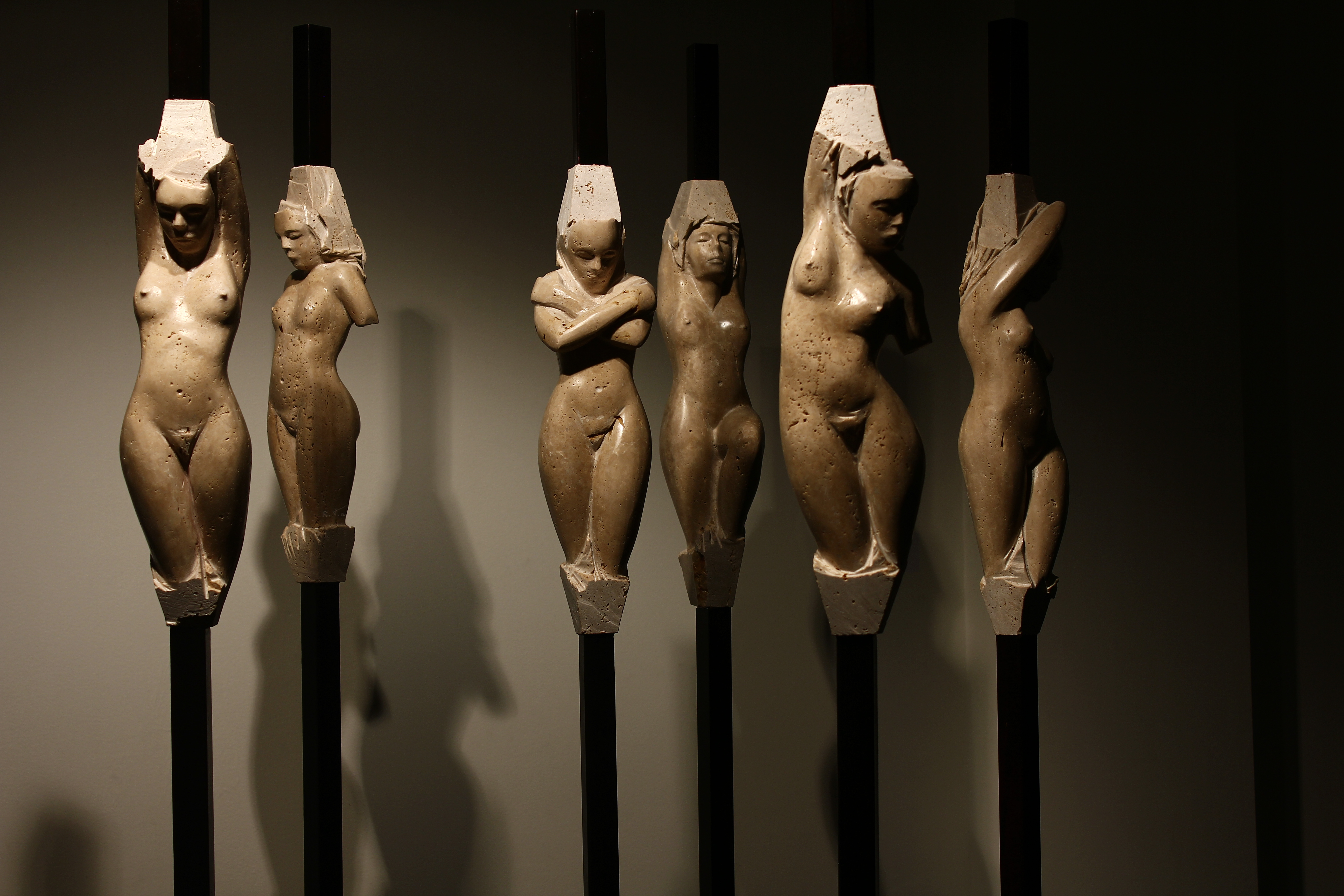 Cariátides